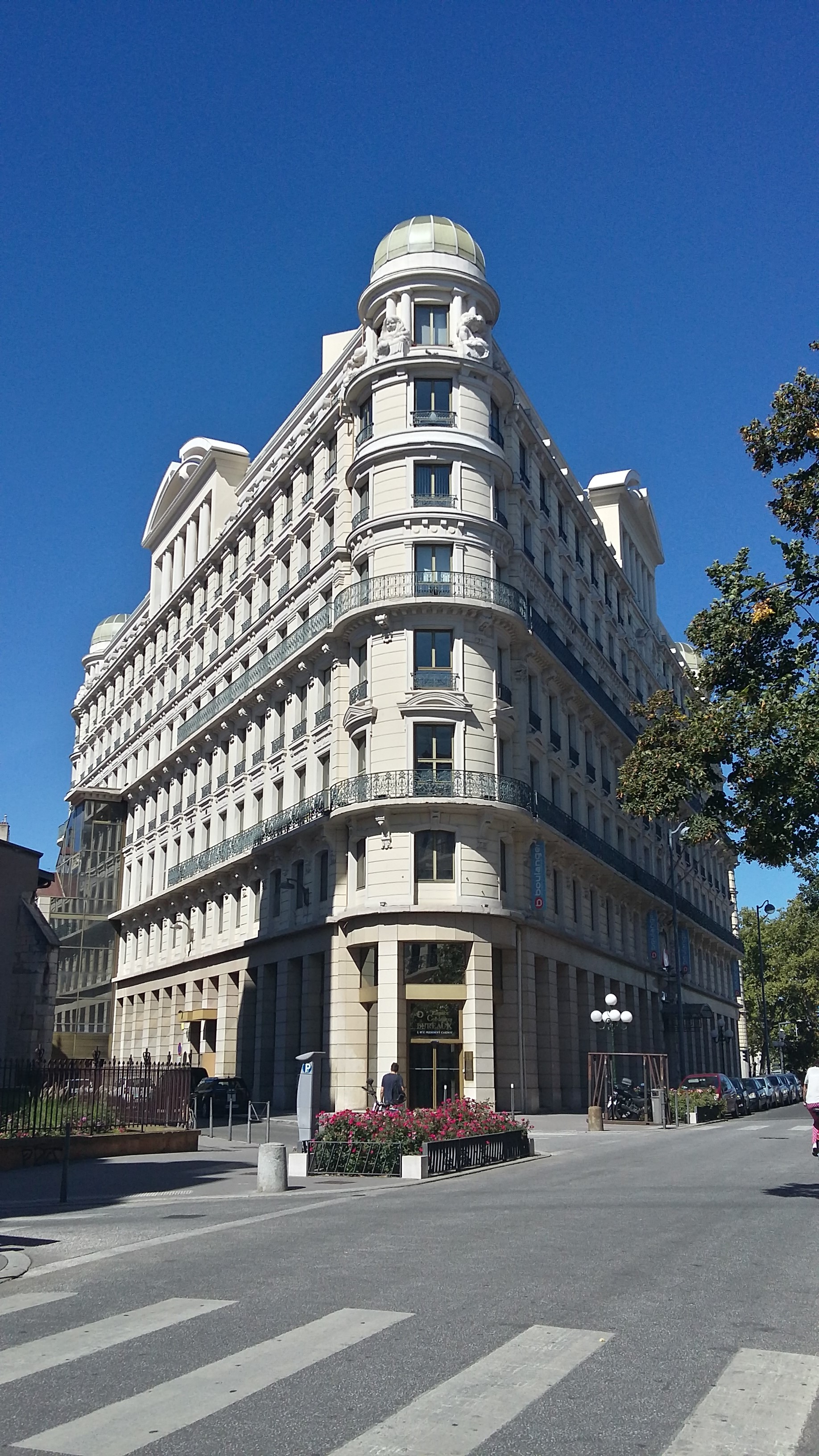 Rue du président Carnot, Lyon